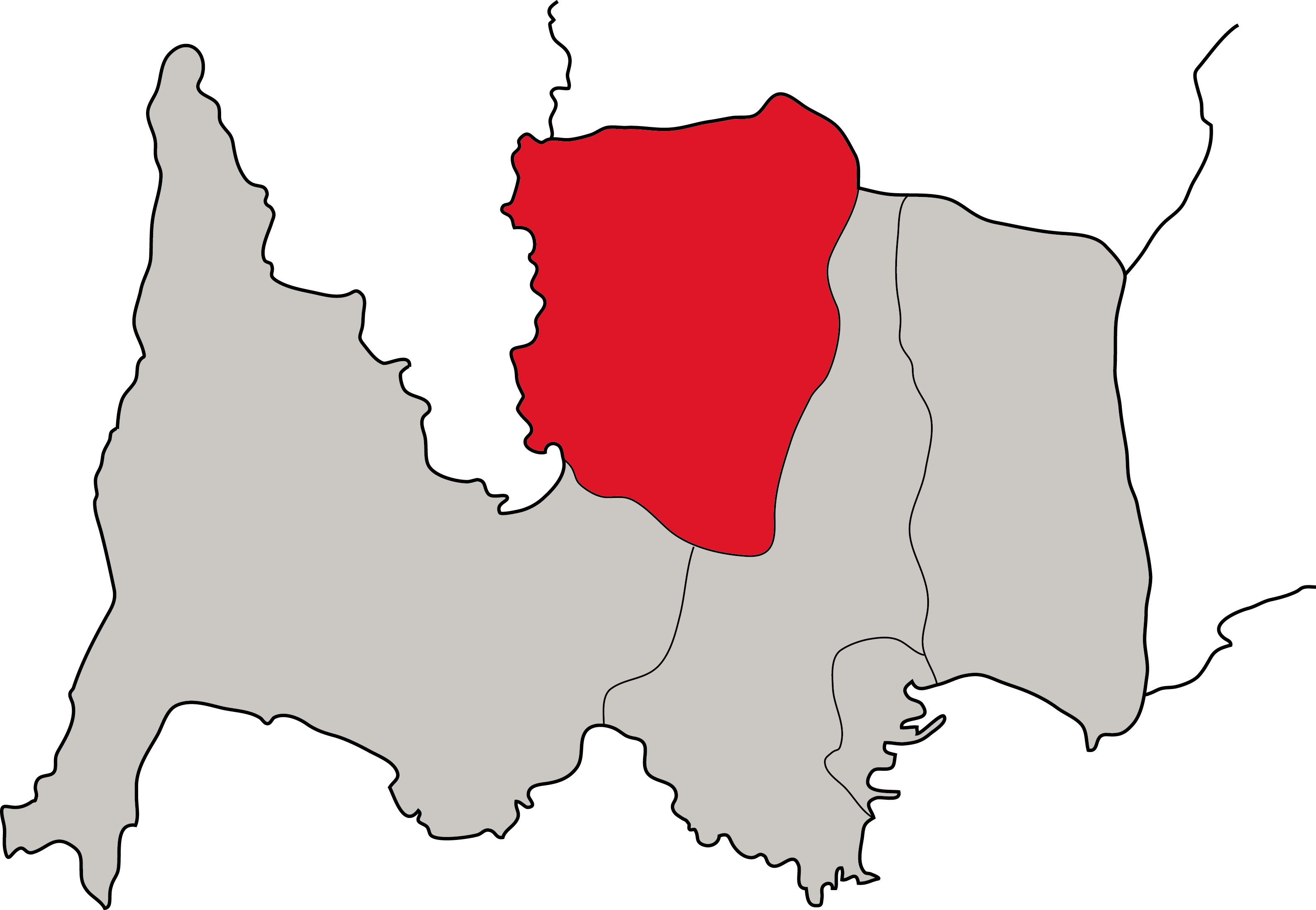 Localizacion da parroquia de Aldán no concello de Cangas.